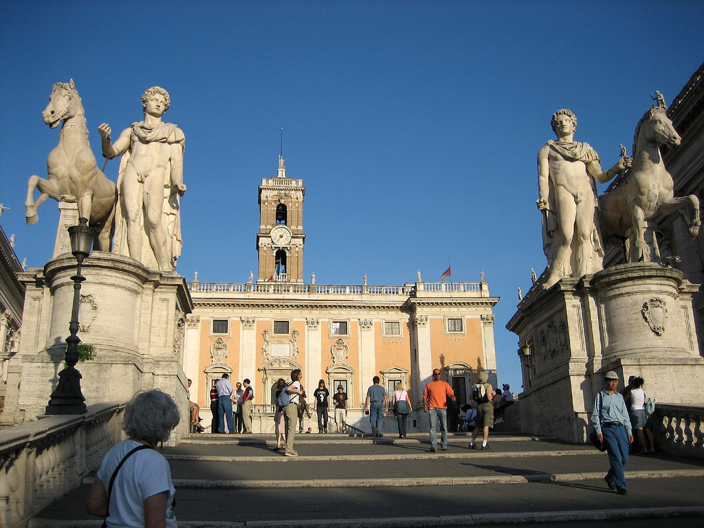 La cordonata del Campidoglio e le statue Dioscuri del Campidoglio a Roma, Italia.